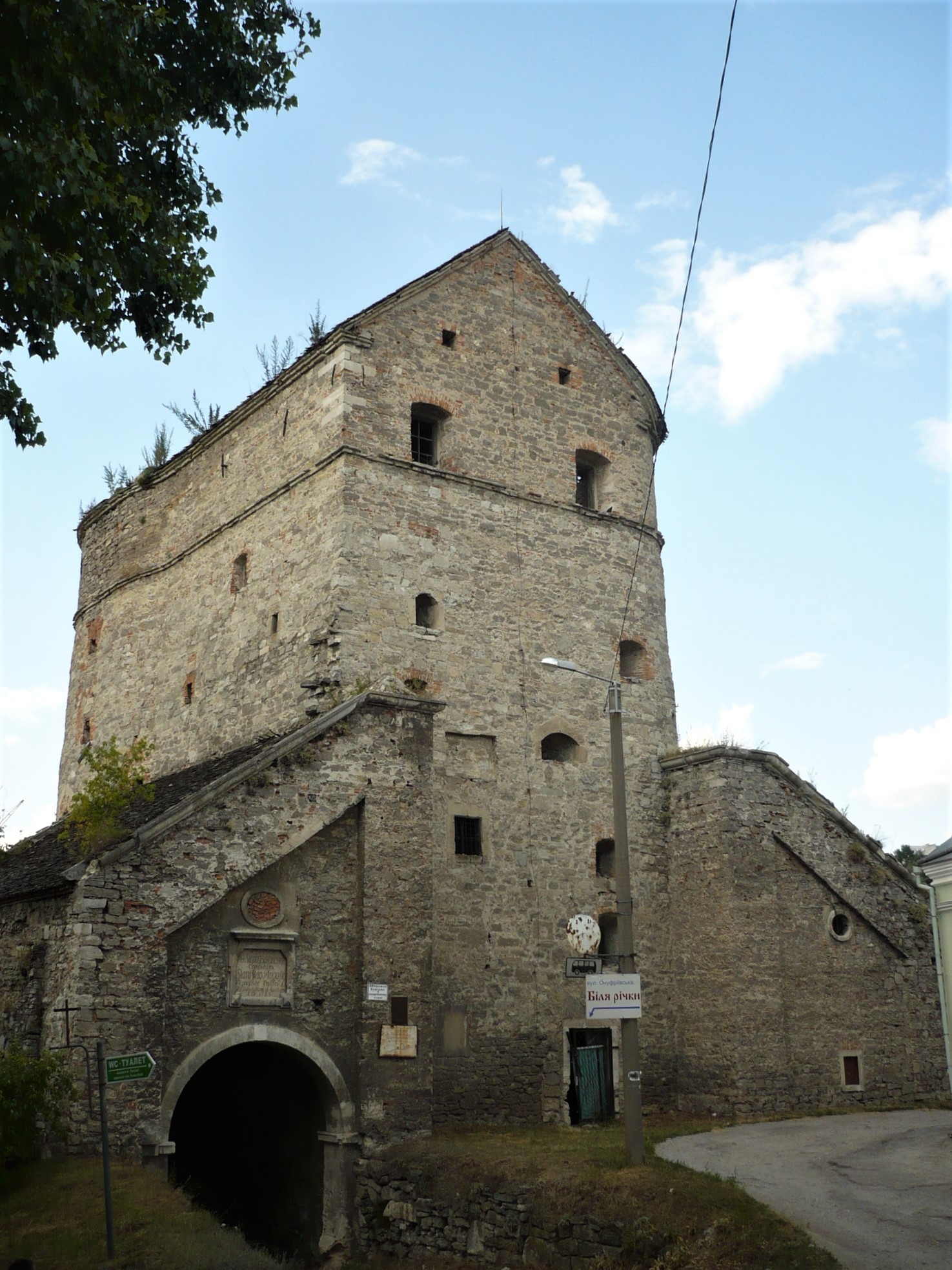 Kamieniec Podolski. Baszta Batorego